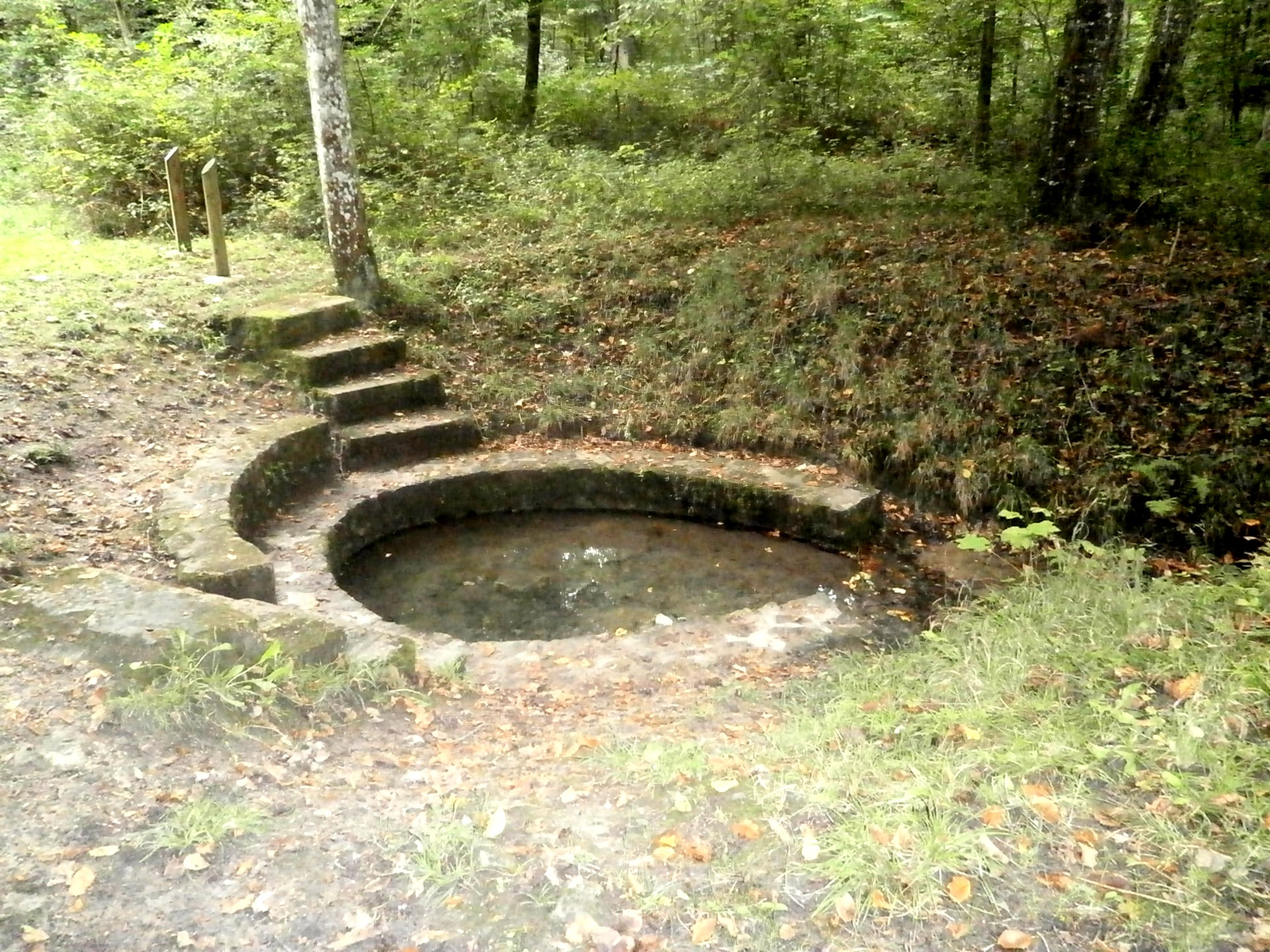 Source d'Orfonds, utilisée pour l'alimentation de l'aqueduc de Contray.